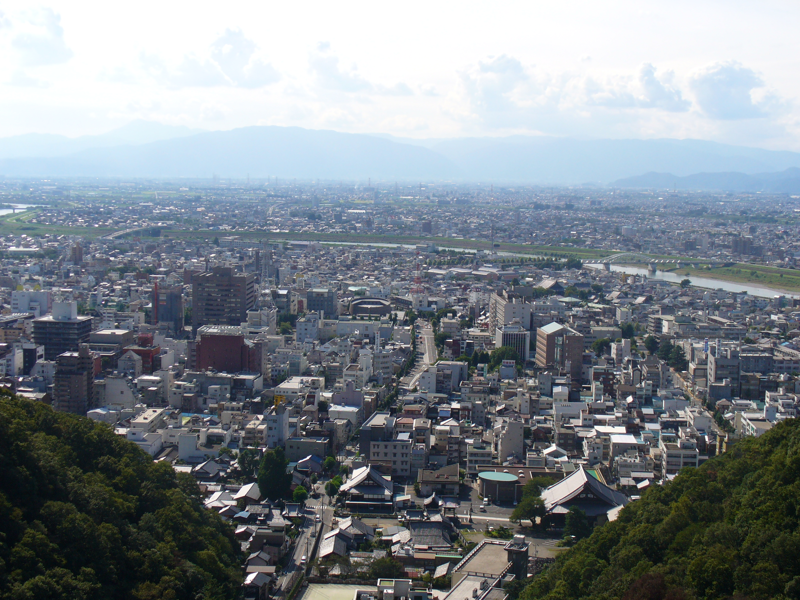 Gifu City（岐阜市）、Gifu,Gifu(岐阜県岐阜市)で撮影。Mt.Kinka Driveway（金華山ドライブウェイ）の金華山展望台より。